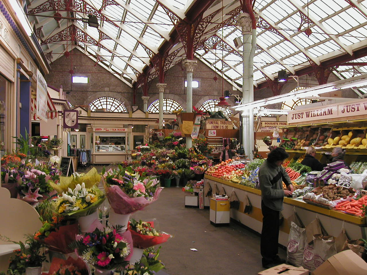 Central Market, St. Helier, Jersey.